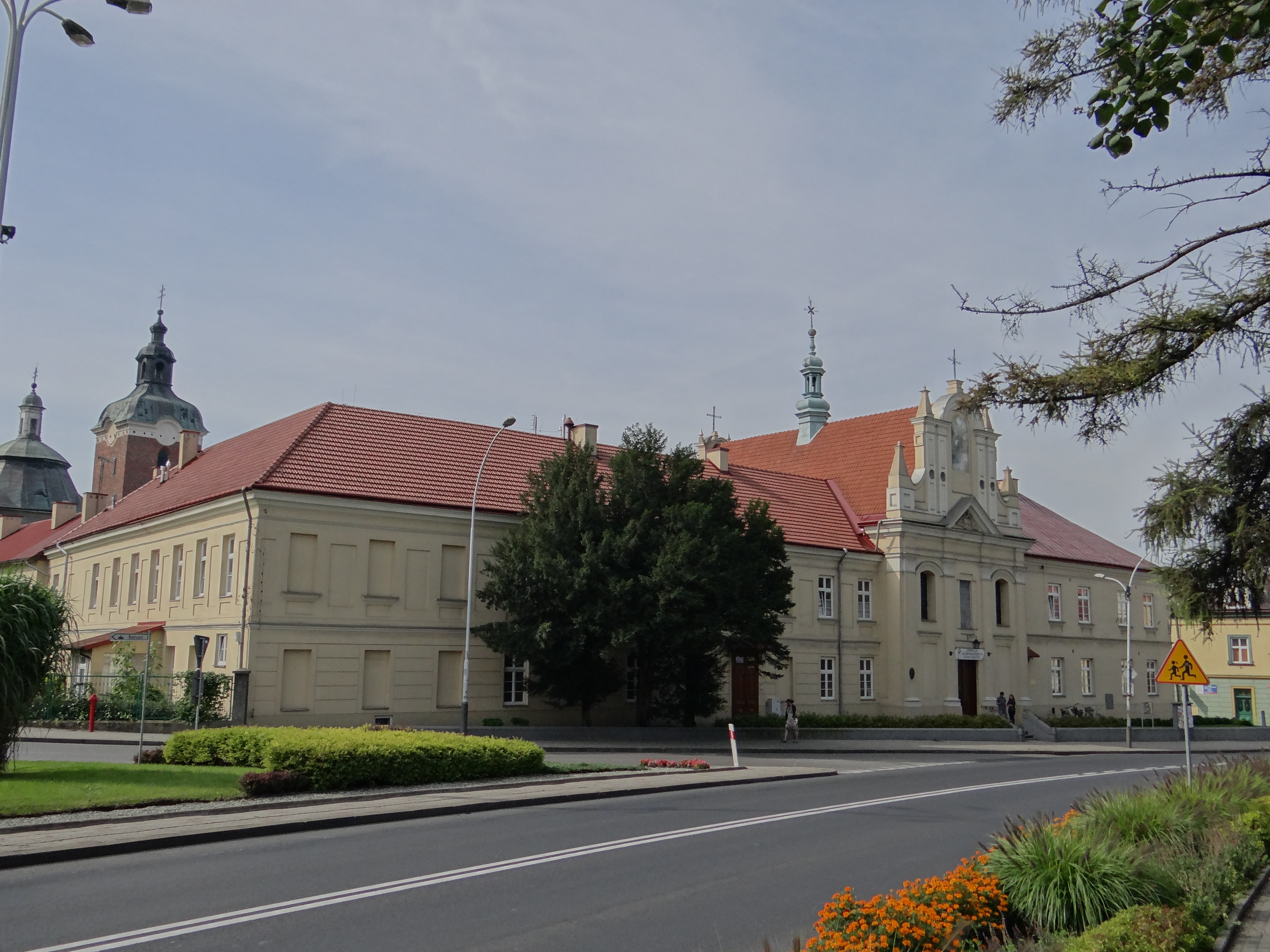 Przeworsk, zespół klasztorny sióstr Miłosierdzia, 1780, XIX